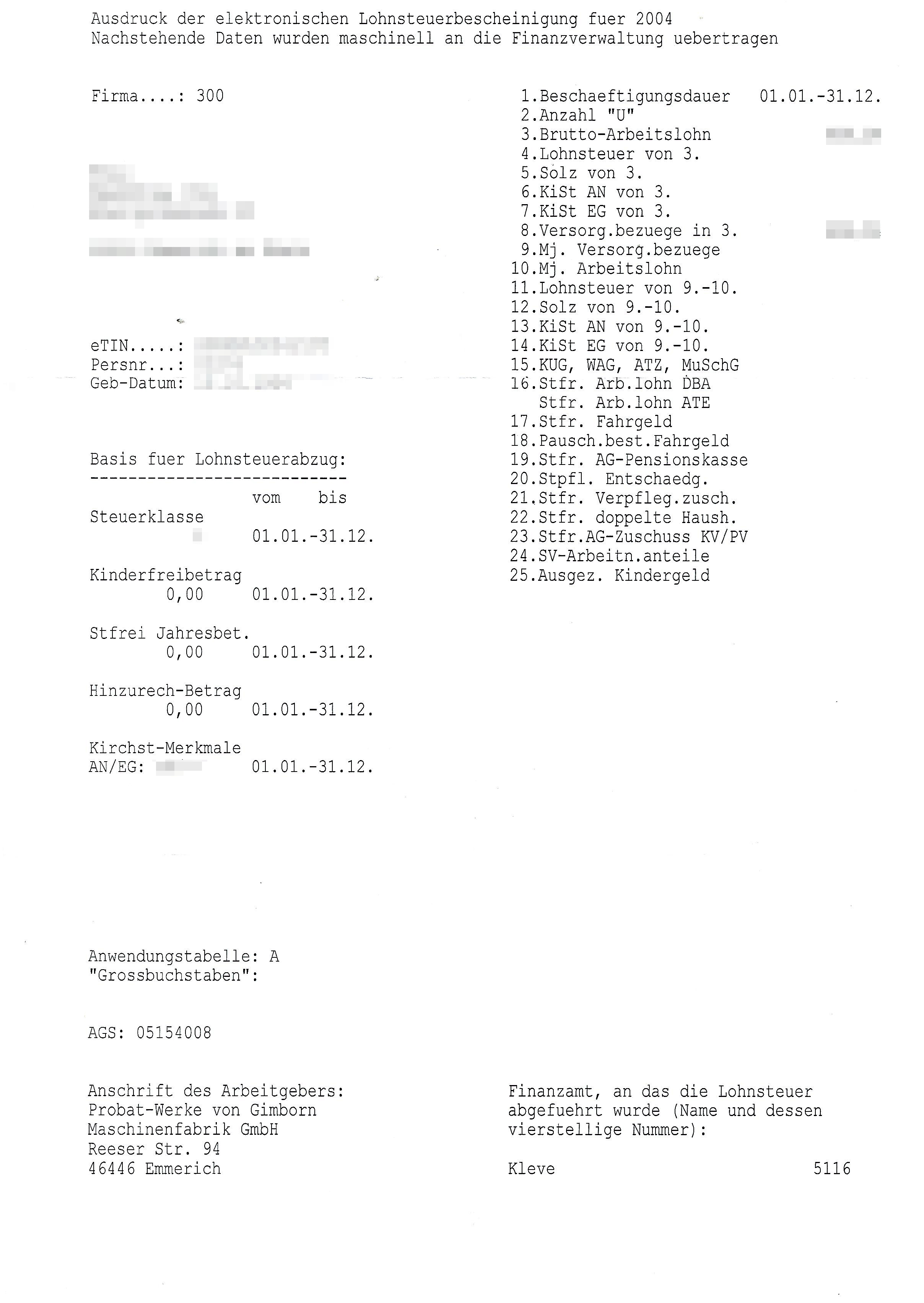 Elektronische Lohnsteuerbescheinigung für das Jahr 2004, ausgestellt von der Probat-Werke von Gimborn Maschinenfabrik GmbH, Emmerich